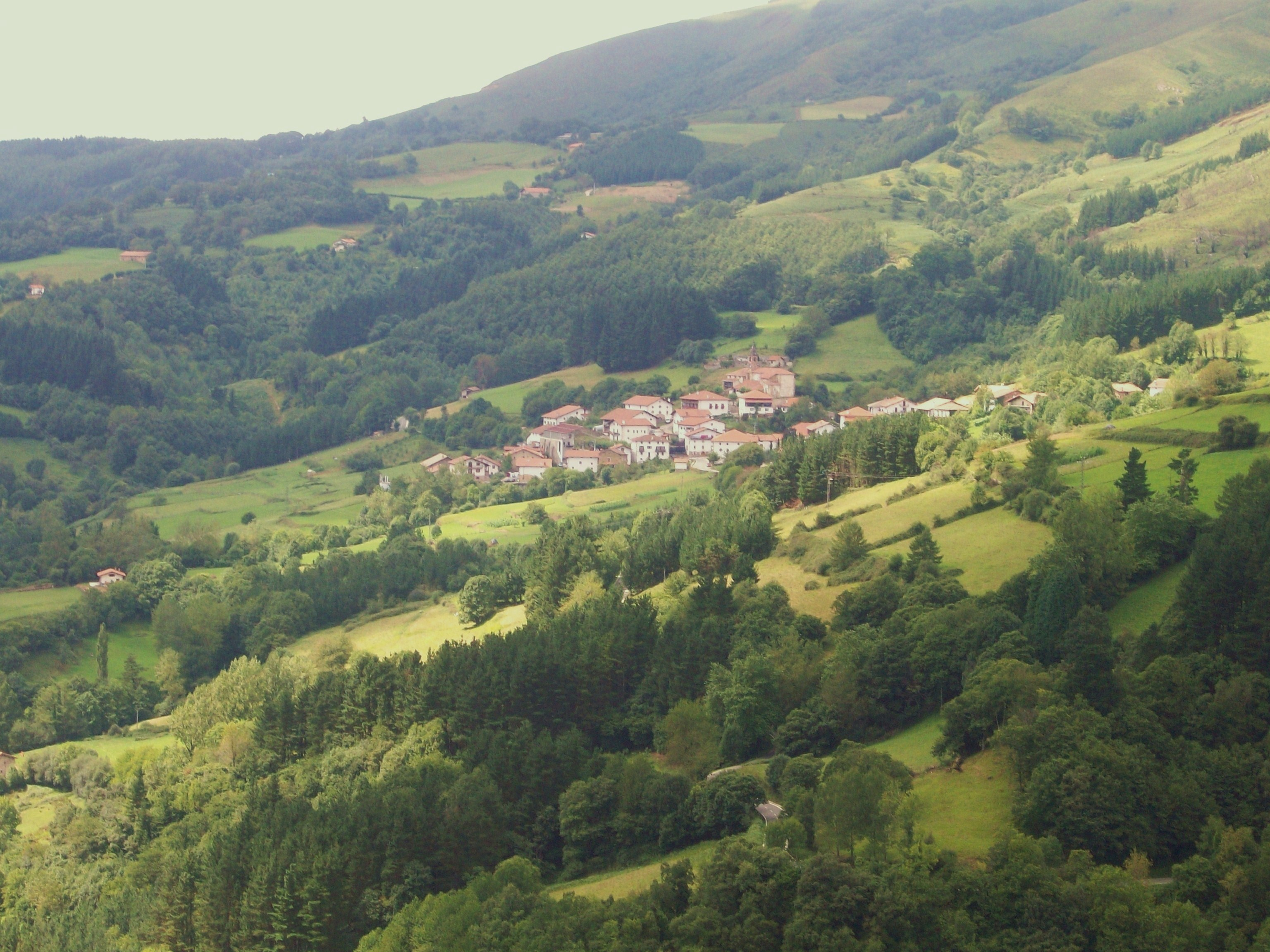 Ezkurra. Malerreka, Nafarroa. Euskal Herria - Ezkurra. Malerreka, Navarre. Basque Country